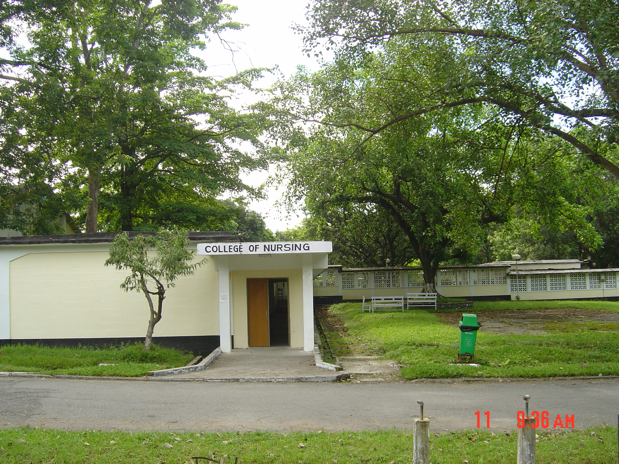 नेपाली: कलेज अफ नर्सिंग, वी.पी. कोइराला स्वास्थ्य विज्ञान प्रतिष्ठान